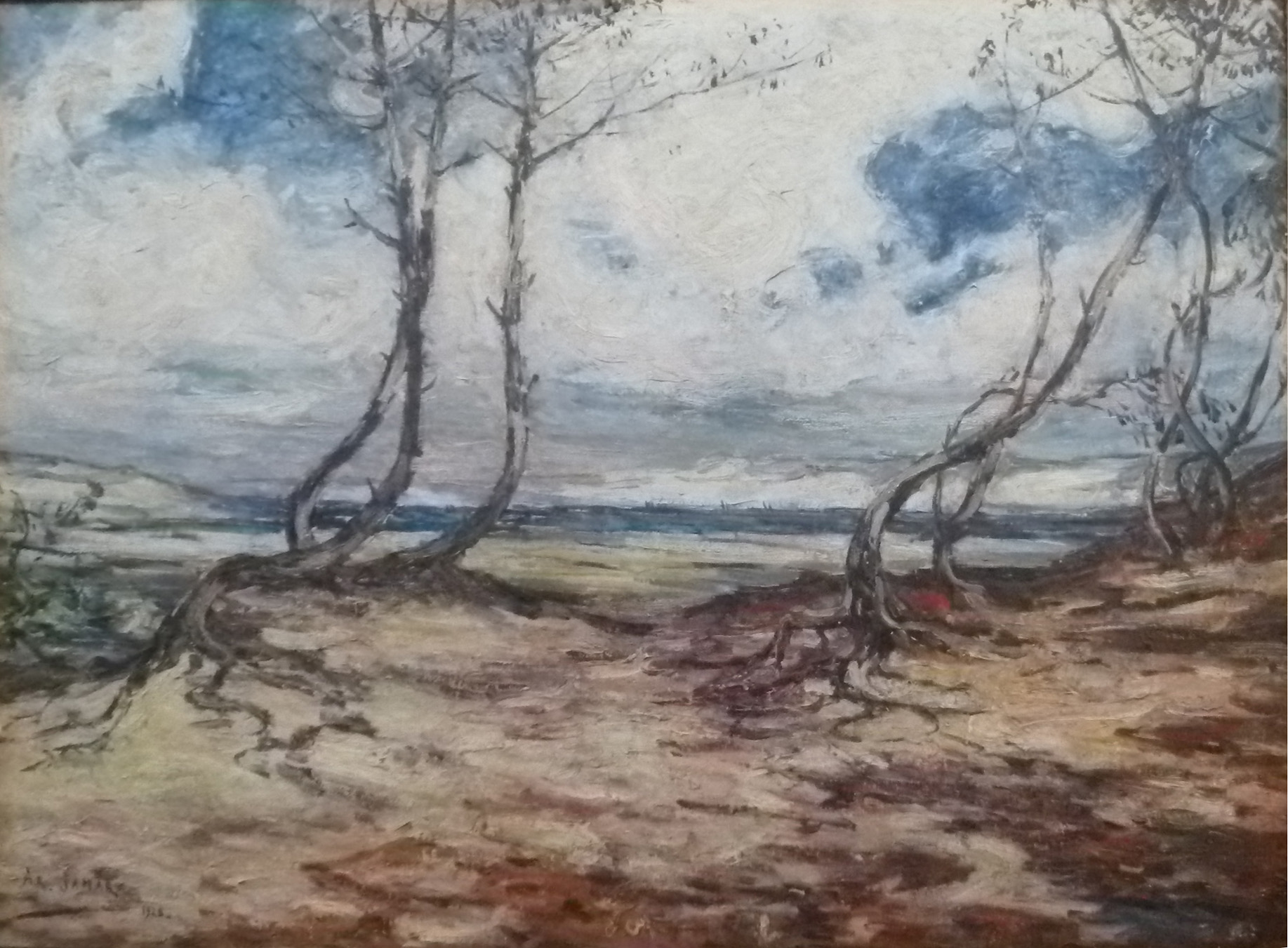 Mediterraan zee- en strandzicht, olieverf op doek (100 x 150 cm) door de Belgische kunstschilder Armand Jamar; privébezit